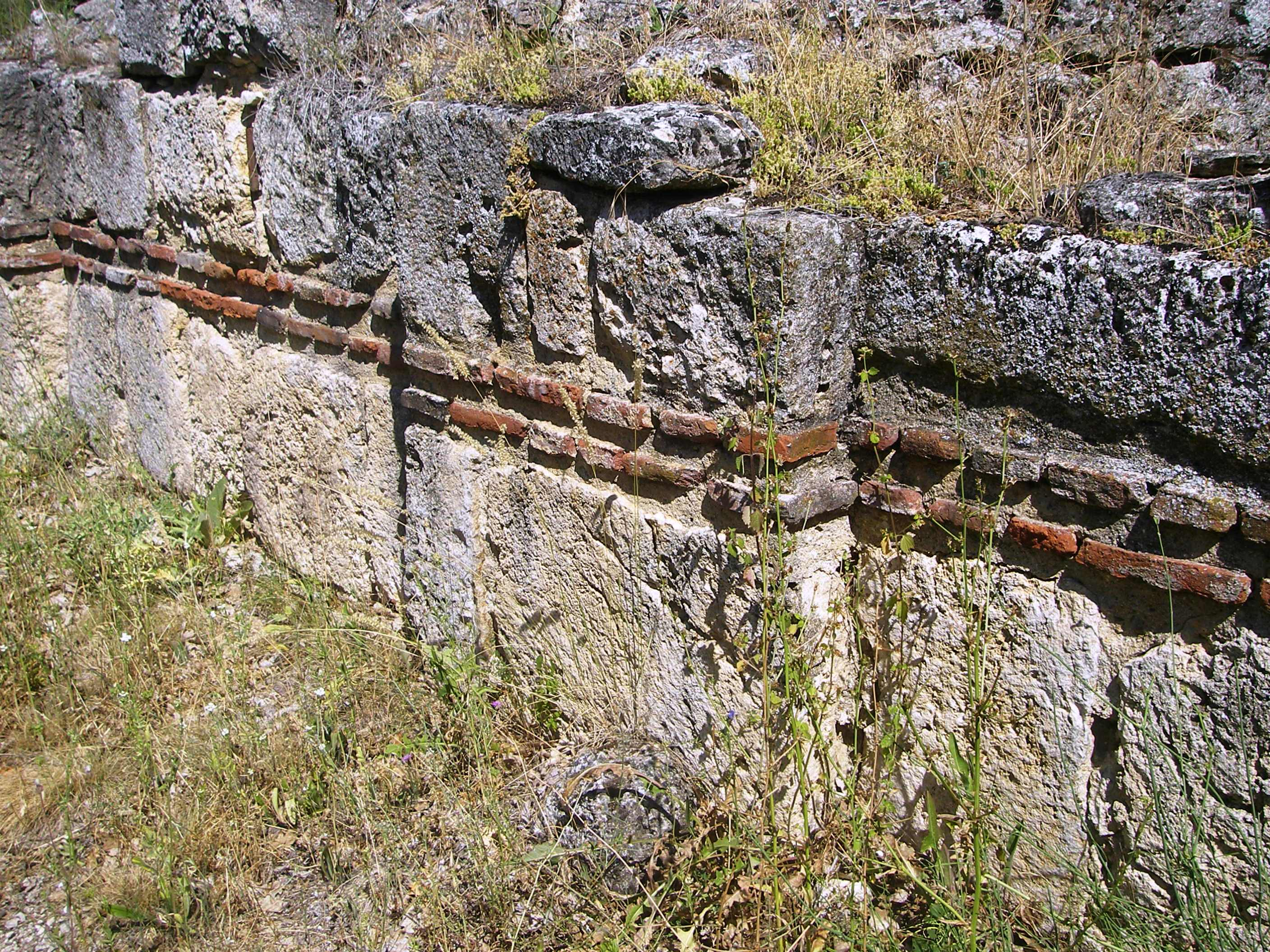 Gjurmët e kishës së vjetër në Verbicë të Kmetocit